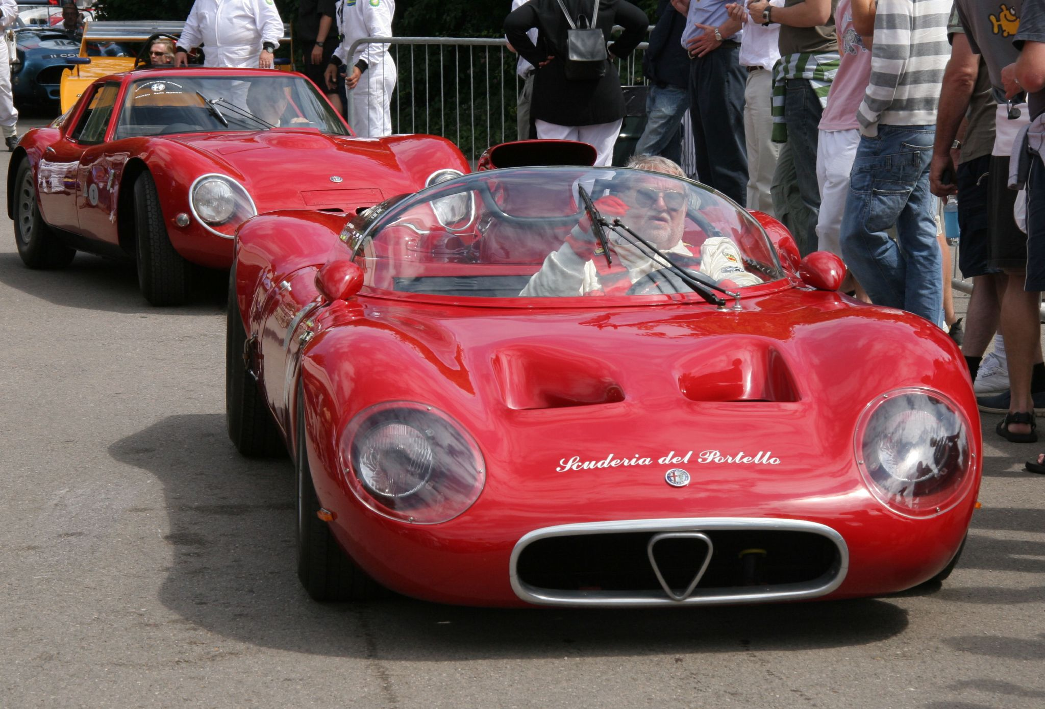 Alfa T33/2 “periscopica”